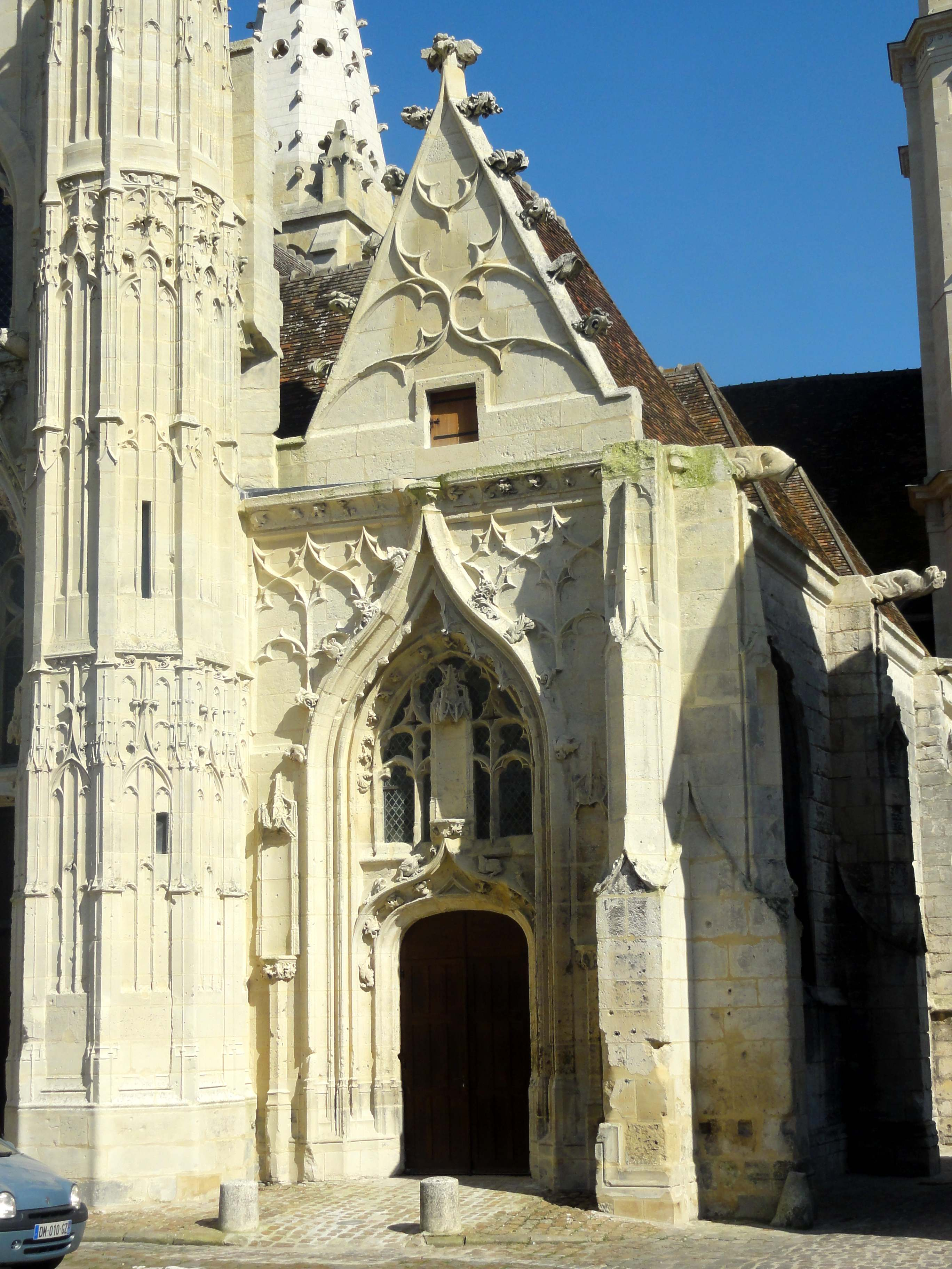 Église Saint-Pierre de Senlis - voir le titre du fichier.